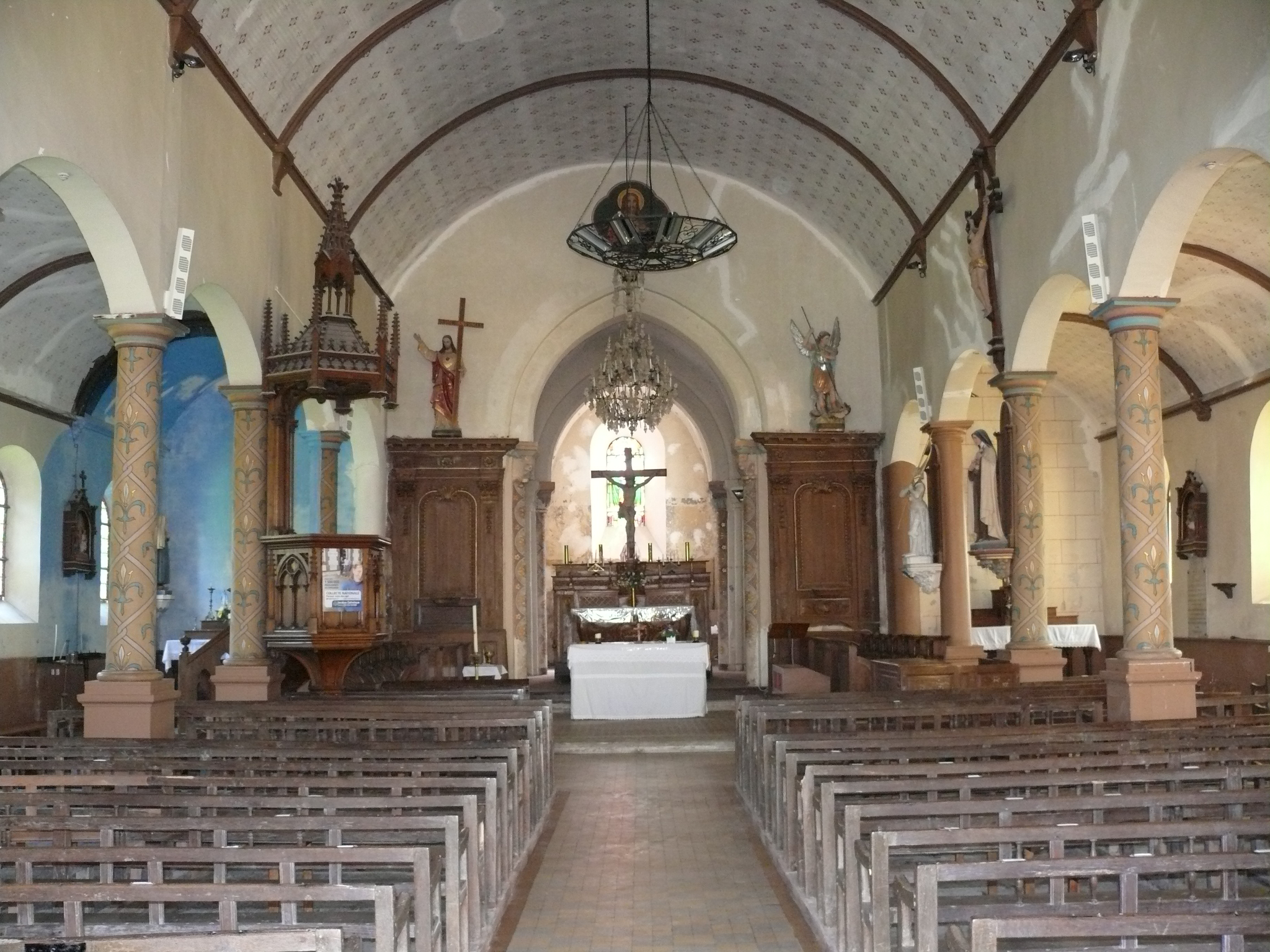 Francastel (Oise - Picardie - France) : Église de la Nativité (intérieur)